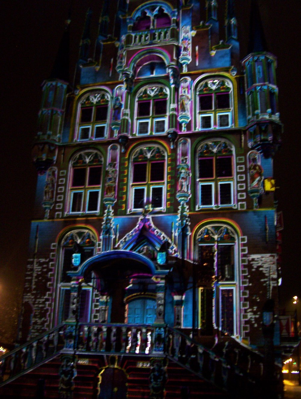 Eigen foto, beschikbaar onder GFDL